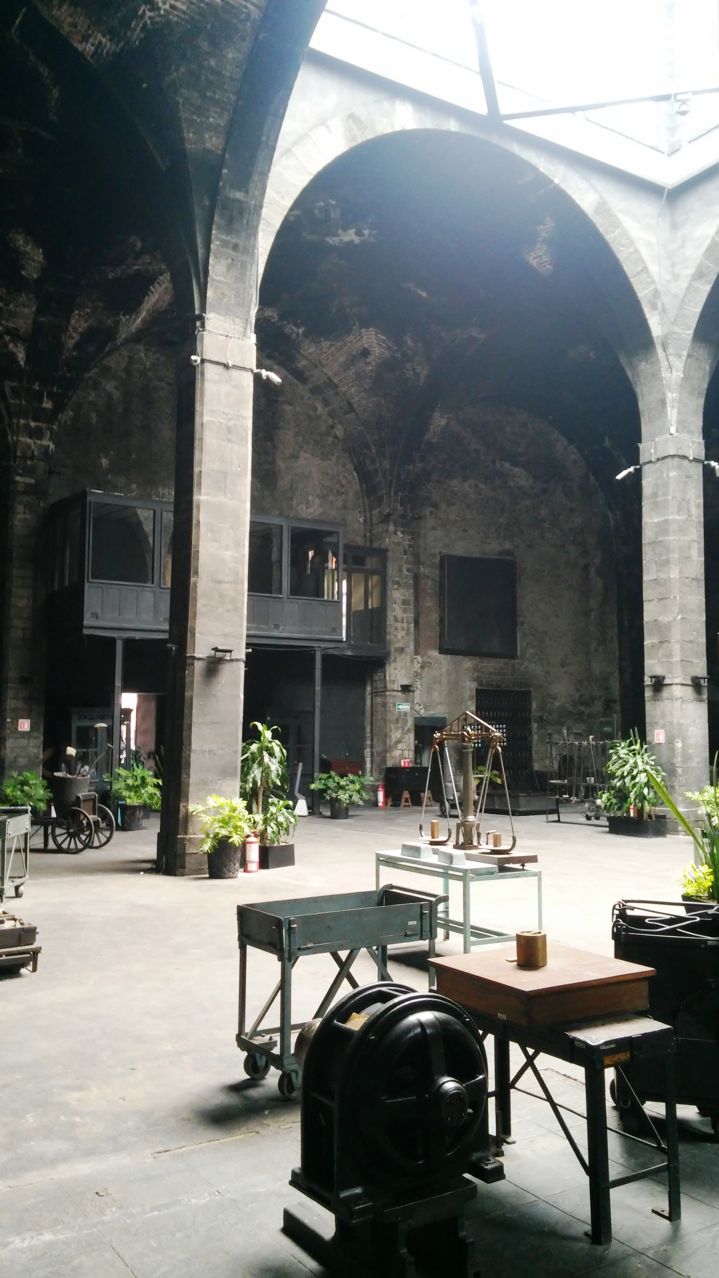 Antigua sala de fundición en el museo numismático nacional en la ciudad de México